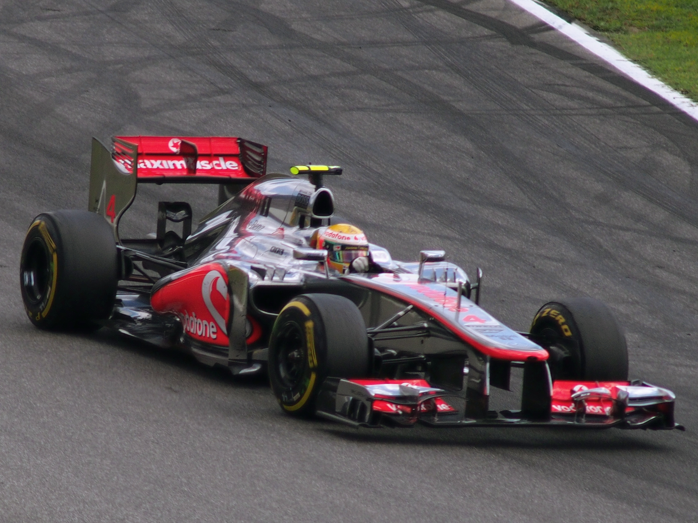 Lewis